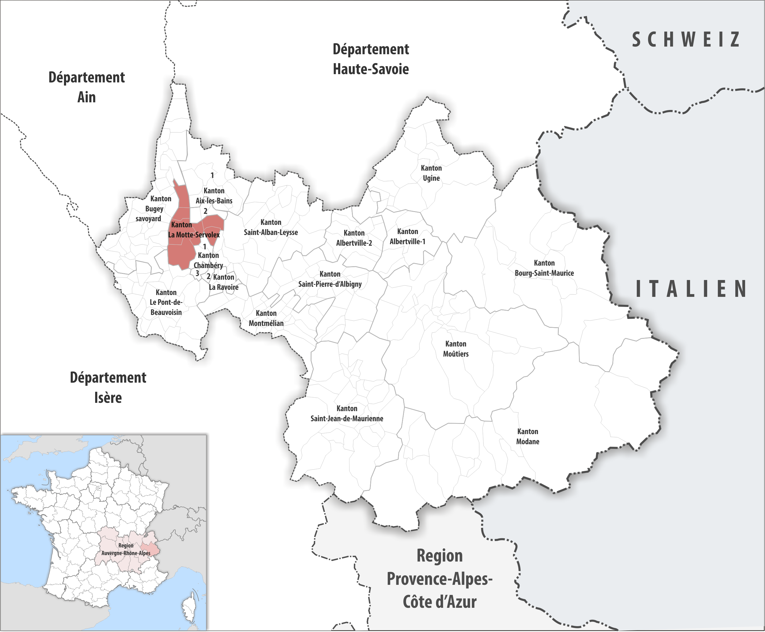 Lage des Kantons La Motte-Servolex